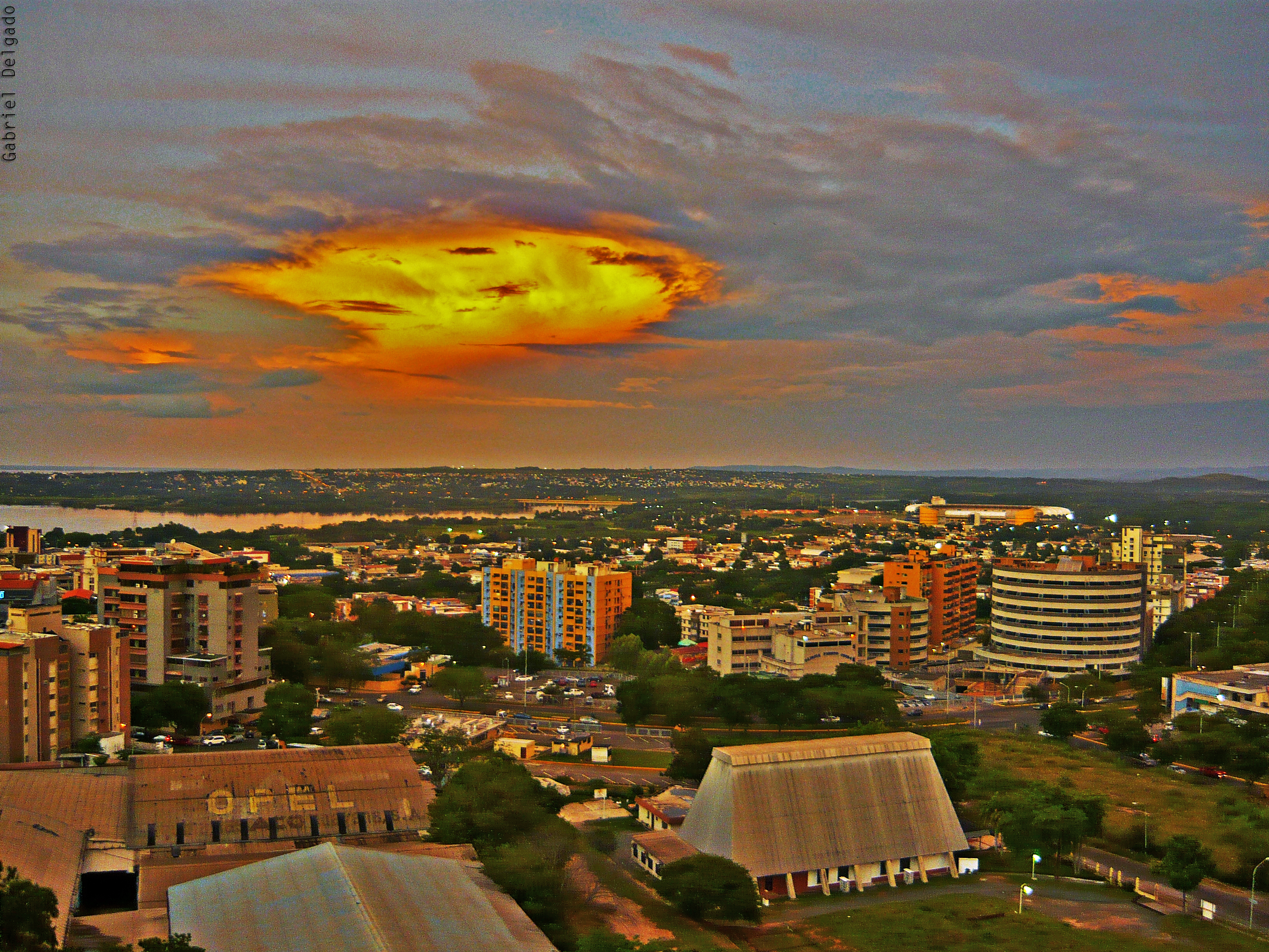 Puerto Ordaz 13/08/09 Atardecer lleno de naranja HDR